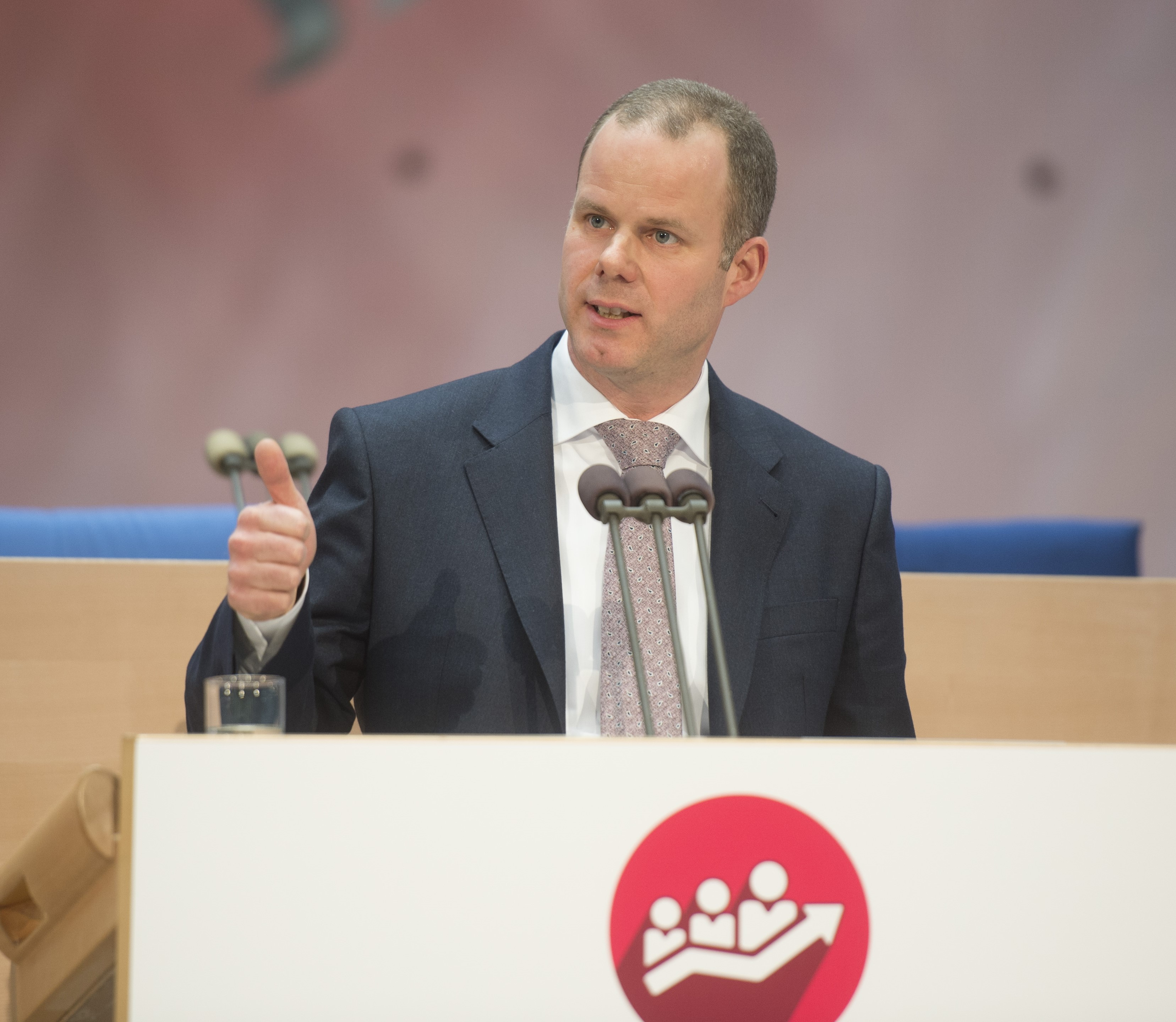 Dr. Markus Schmitz im ehemaligen Bonner Bundestag bei einem Führungskongress der BA, 2018